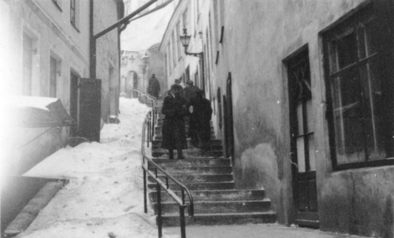 Reval [Tallin], 17.-18.1.1943 Kurzer Domberg Einsatzstab Reichsleiter Rosenberg für die besetzten Gebiete - Hauptarbeitsgruppe Ostland Film: 59/16